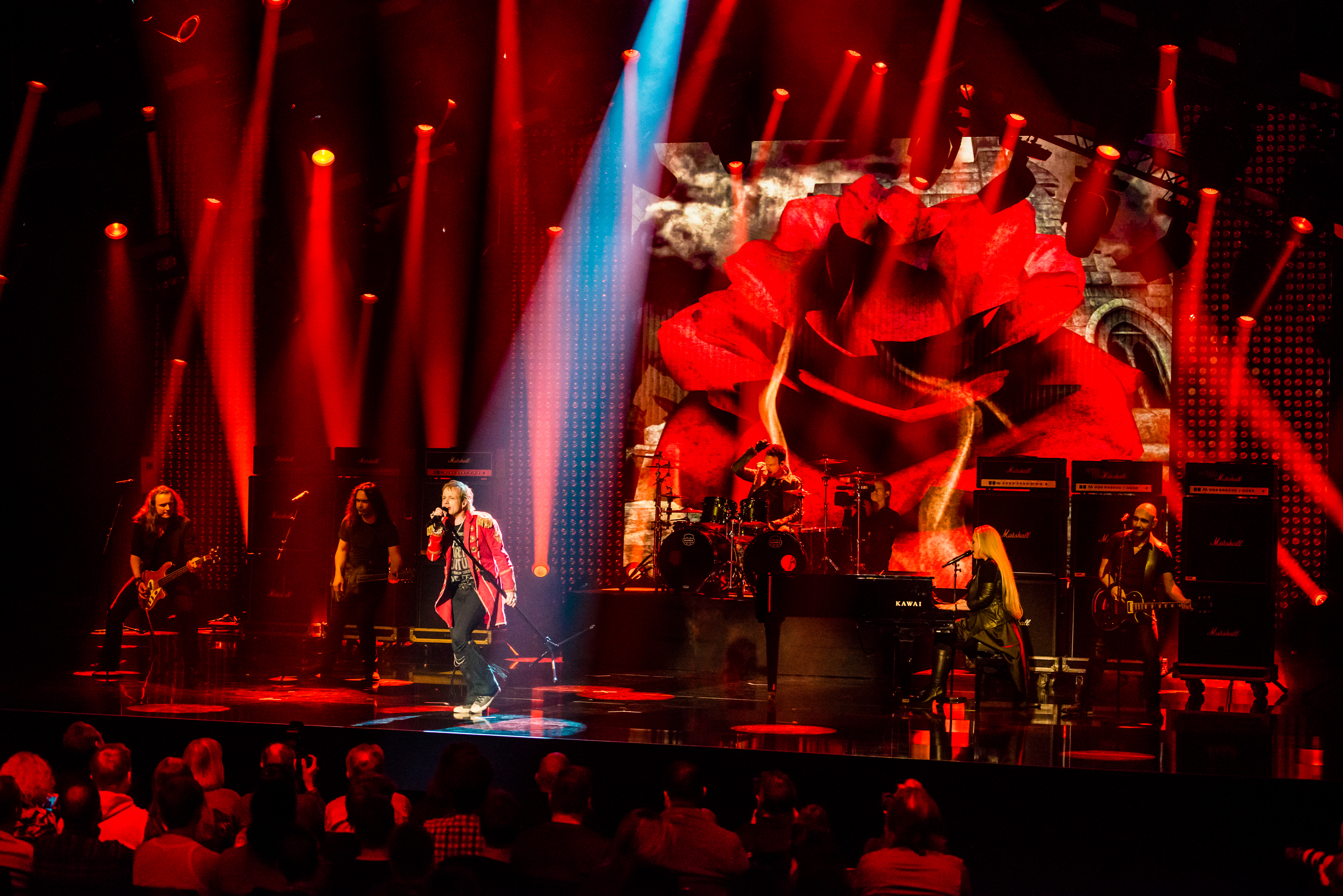 Eurovision Song Contest 2016 - Unser Lied für Stockholm - Avantasia